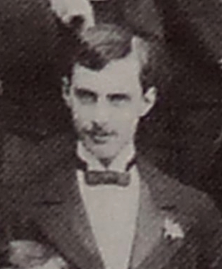 Hippolyte Dreyfus-Barney sur une photo de la classe du lycée Condorcet (philosophie en 1890).